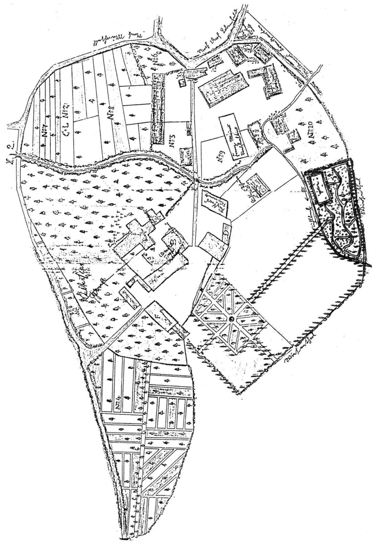 Planskizze von Kloster Lobenfeld im Zustand von 1794/95